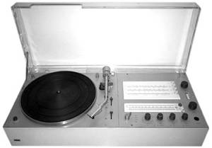 Braun Audio 310 von 1971 ("Schneewitchensarg"-Nachfolger. Design Dieter Rams.)